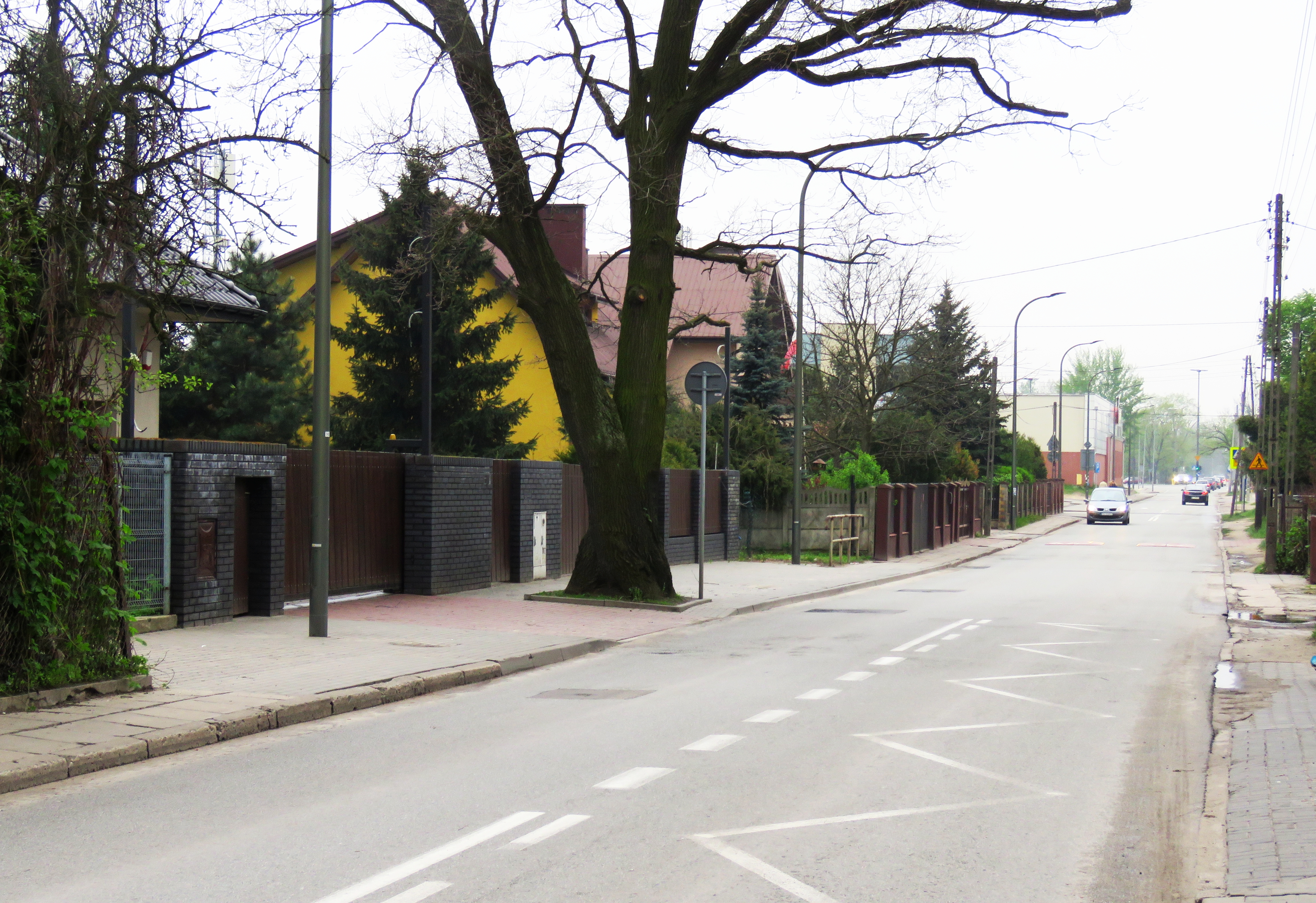 Osiedle Henryków, ulica Mehoffera